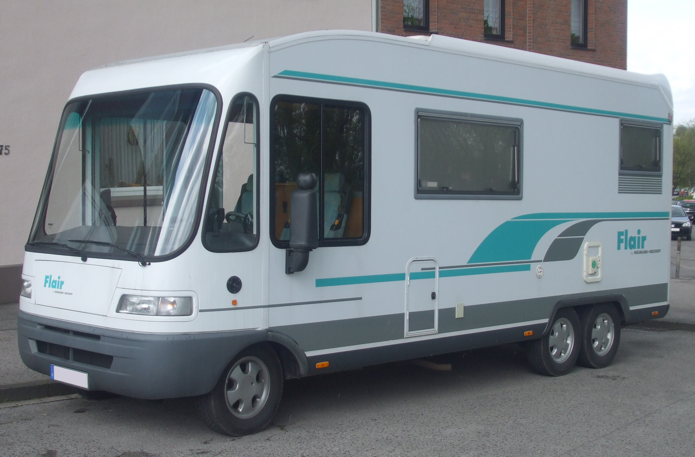 integriertes Wohnmobil „Niesmann+Bischoff Flair I 6700“, Baujahr ~1995, Leistung 85 kW (116 PS)